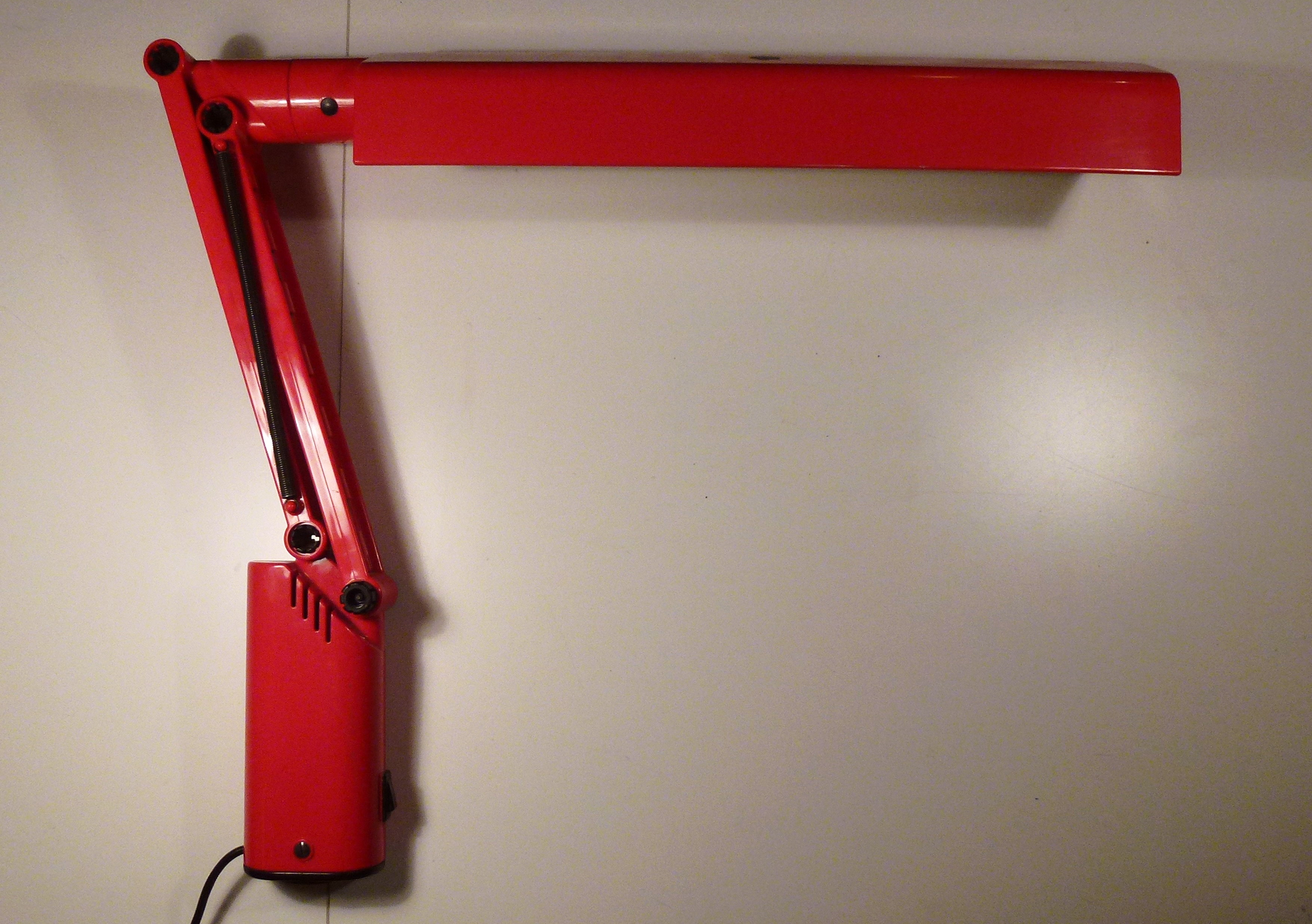 Skrivbordslampa "Lucifer", A&E Design